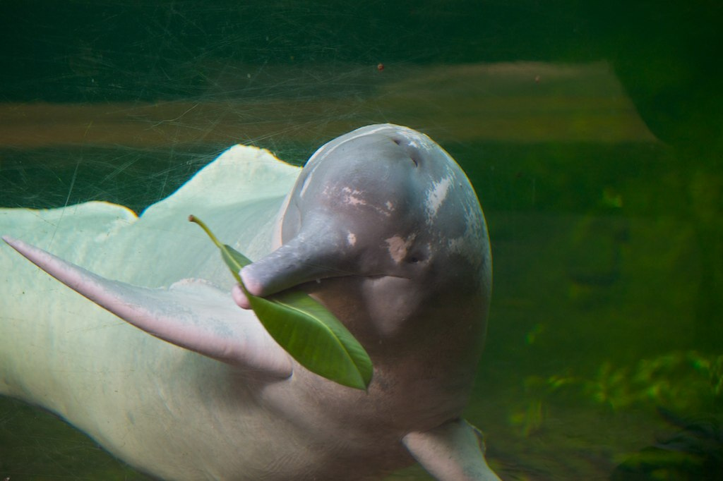 דולפין האמזונאס